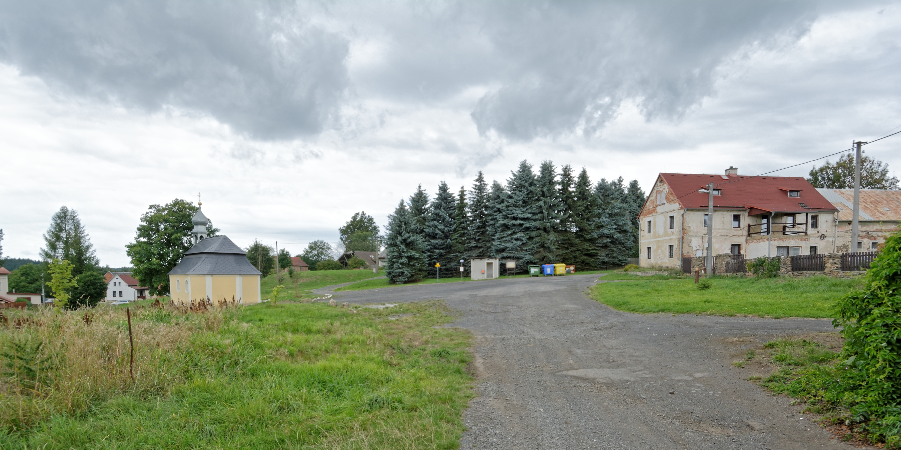 Sovolusky u Bochova, střed obce s kaplí sv. Jakuba, pohled od východu.